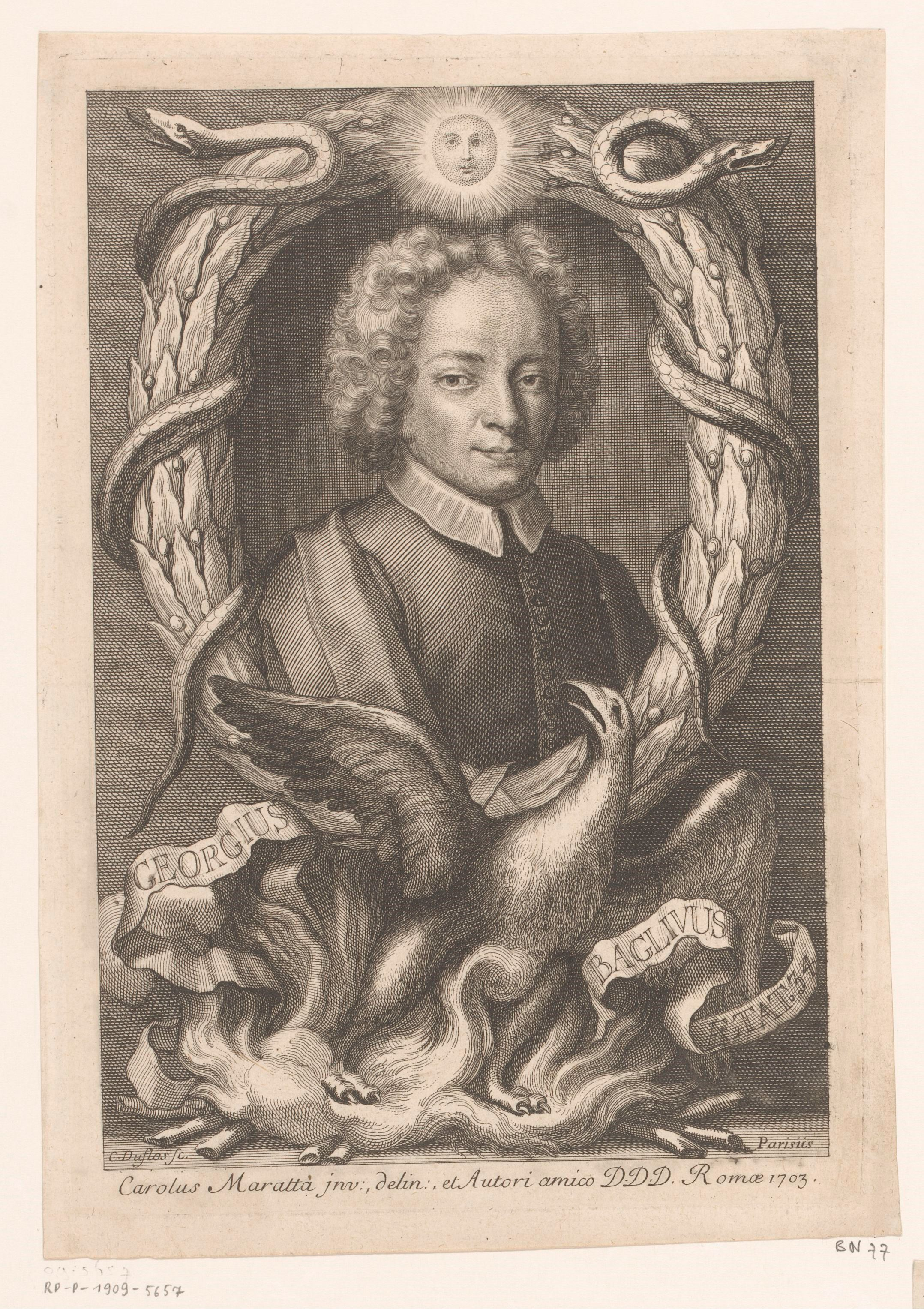 IdentificatieTitel(s): Portret van Giorgio Baglivi op 34-jarige leeftijdGeorgius Baglius aetat. 34 (titel op object)Objecttype: prent Objectnummer: RP-P-1909-5657Catalogusreferentie: IFF 18e siècle 77LeBlanc 137Opschriften / Merken: verzamelaarsmerk, verso, gestempeld: Lugt 2228VervaardigingVervaardiger: prentmaker: Claude I Duflos (vermeld op object)naar tekening van: Carlo Maratti (vermeld op object)naar ontwerp van: Carlo Maratti (vermeld op object)opgedragen door: Claude I Duflos (vermeld op object)opgedragen aan: Carlo Maratti (vermeld op object)Plaats vervaardiging: ParijsDatering: 1703Materiaal: papier Techniek: graveren (drukprocedé) / etsenAfmetingen: plaatrand: h 213 mm × b 147 mmOnderwerpWat: historical personsphysician, doctorfabulous animals ~ birds: phoenixsnakesWie: Giorgio BagliviVerwerving en rechtenVerwerving: aankoop 1905Copyright: Publiek domein